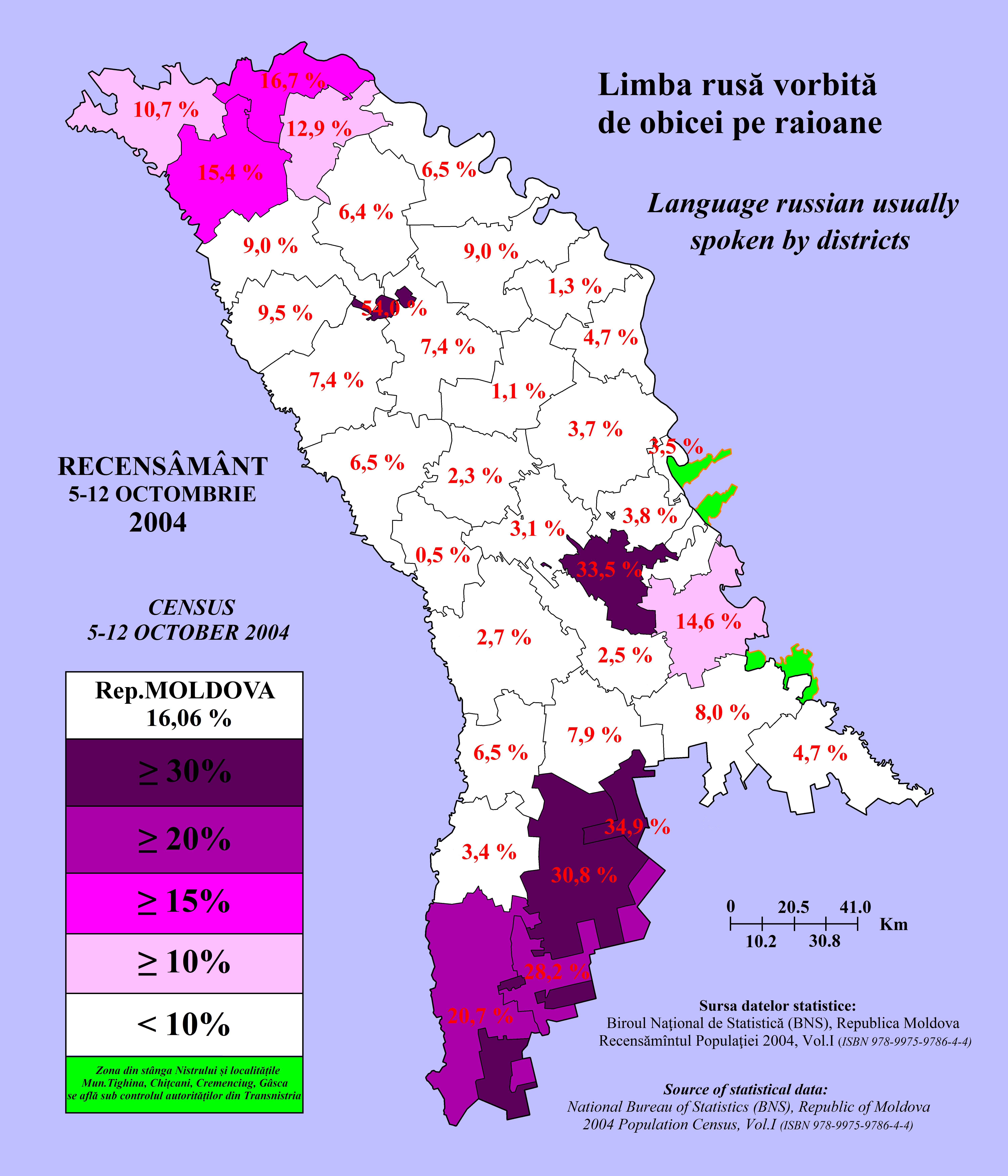 Limba rusă vorbită de obicei pe raioane în Rep.Moldova (2004)